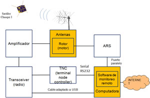 ESTER